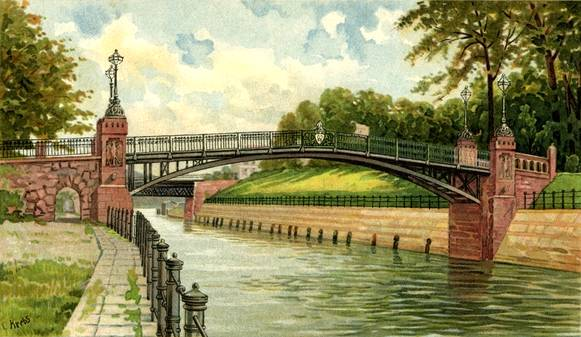 Parkbrücke über den Teltowkanal in Babelsberg im Jahr 1906 (nachcolorierte Ansichtskarte eines Fotos aus der "Zeitschrift für Bauwesen, 56. Jg. (1906), Tafel 68").